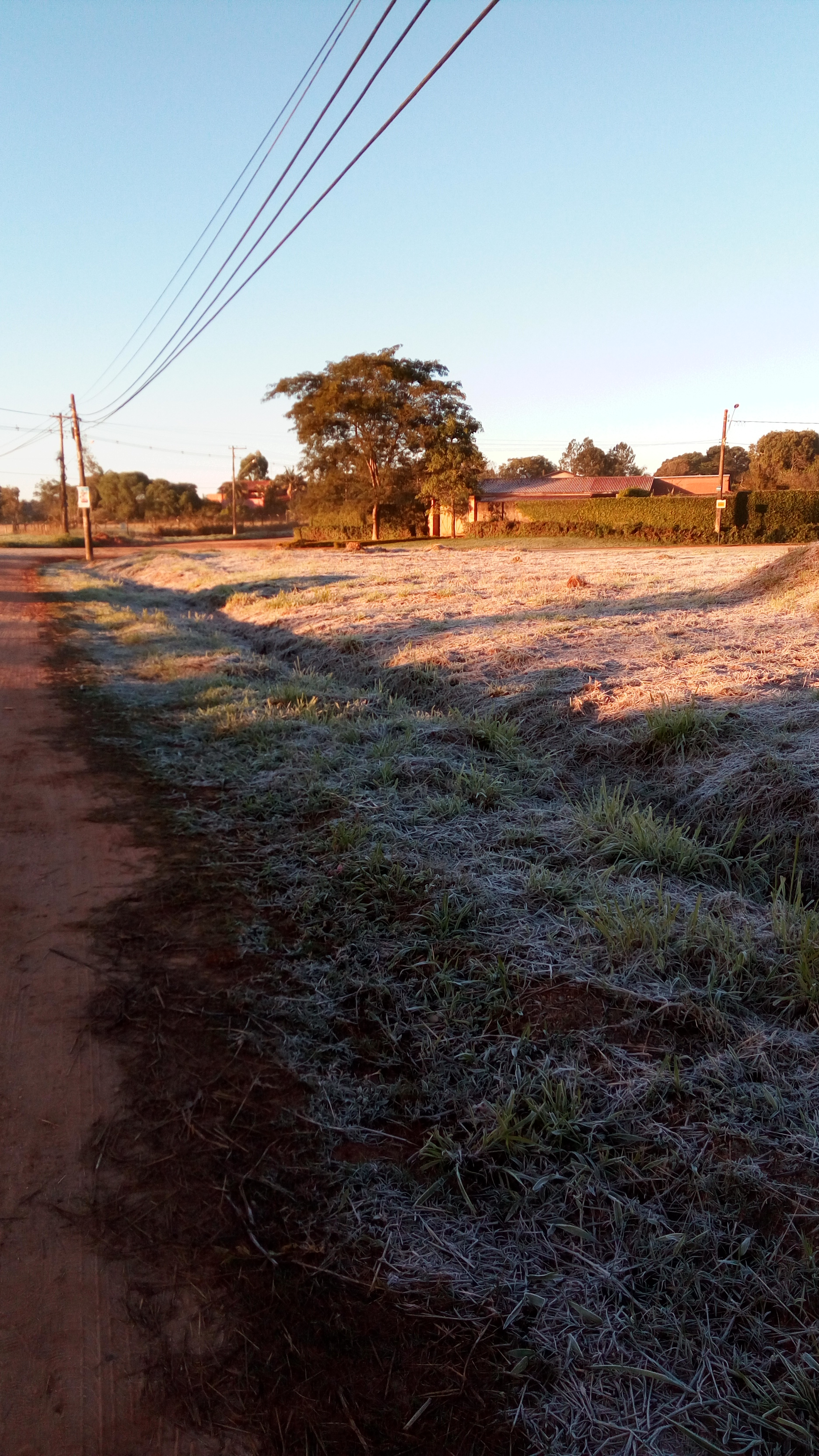 Forte geada em Itapetininga - SP no dia 13/06/2016, quando a temperatura caiu para -3,3 °C.